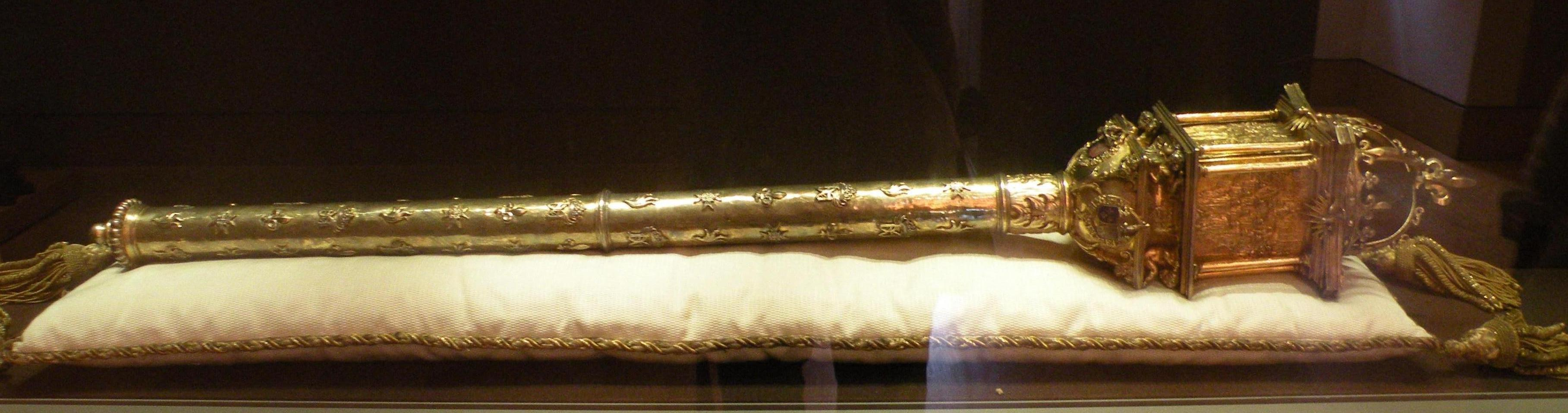 Masse_de_l'ordre_du_Saint_Esprit XVIeme siècle François II DUJARDIN